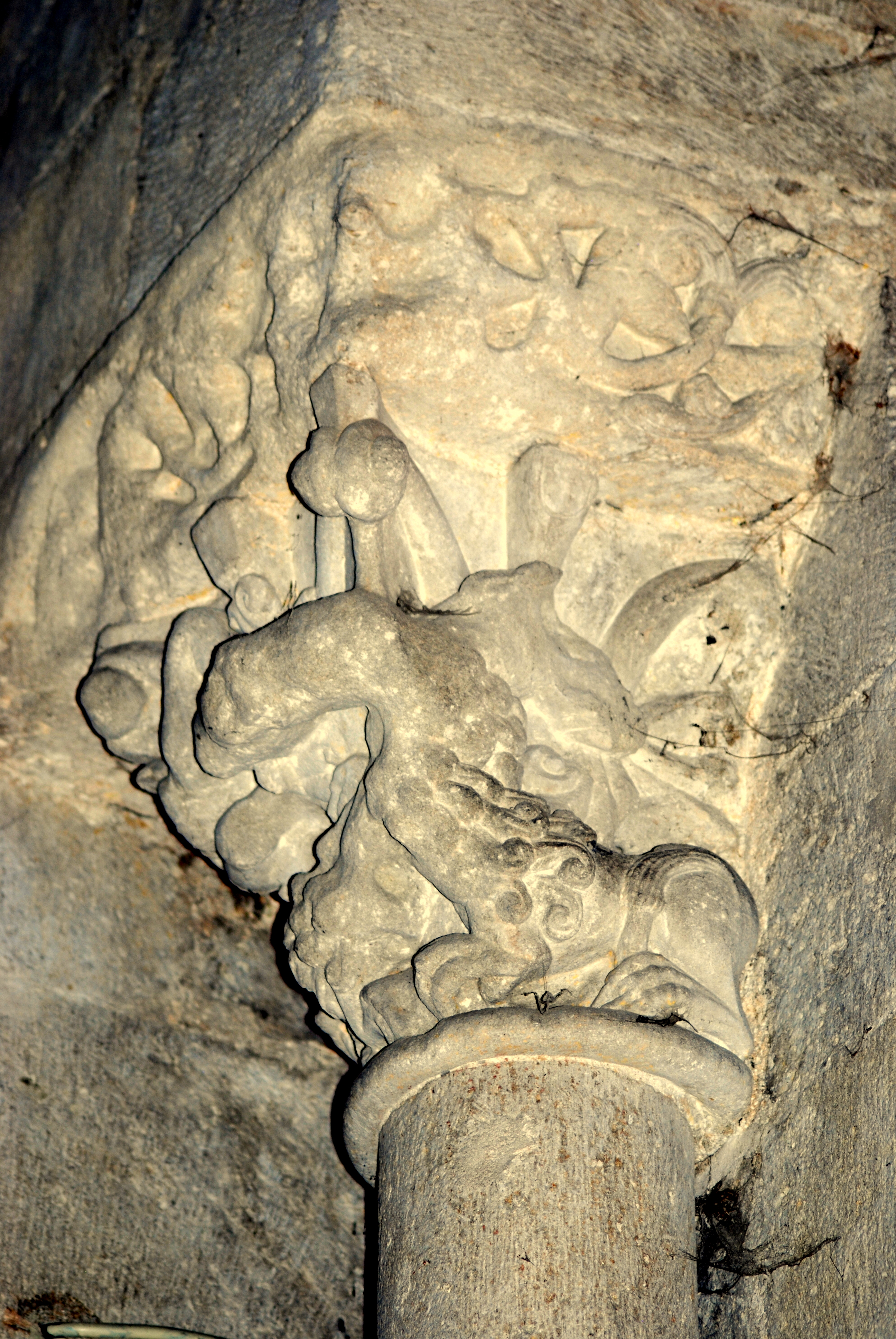 Chapiteaux de l'abbaye de Saint-Ferme